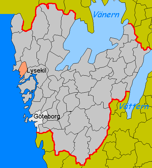 date aug. 2005